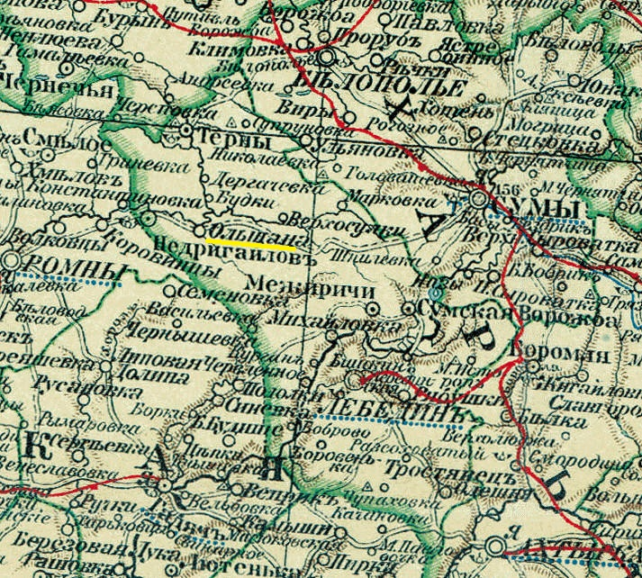 Харьковская губерния Лебединский уезд